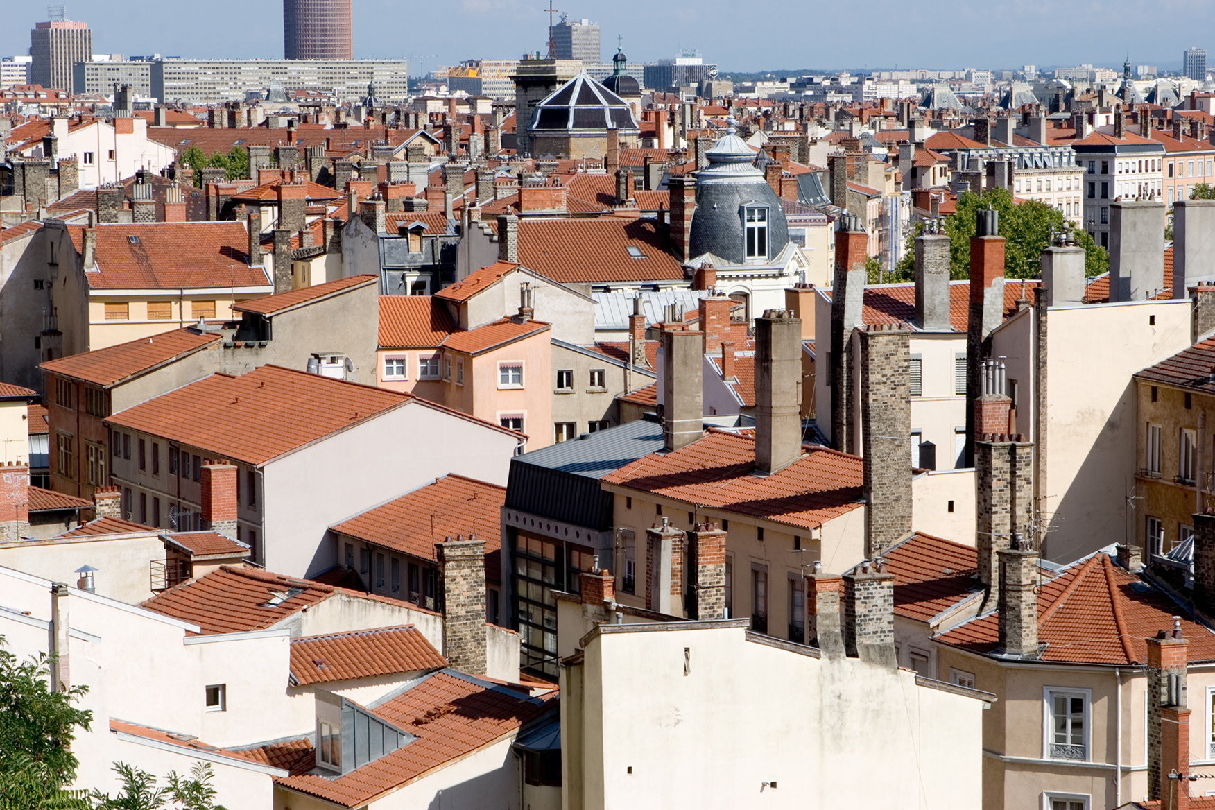 Toits, Lyon, France, depuis la place Rouville.